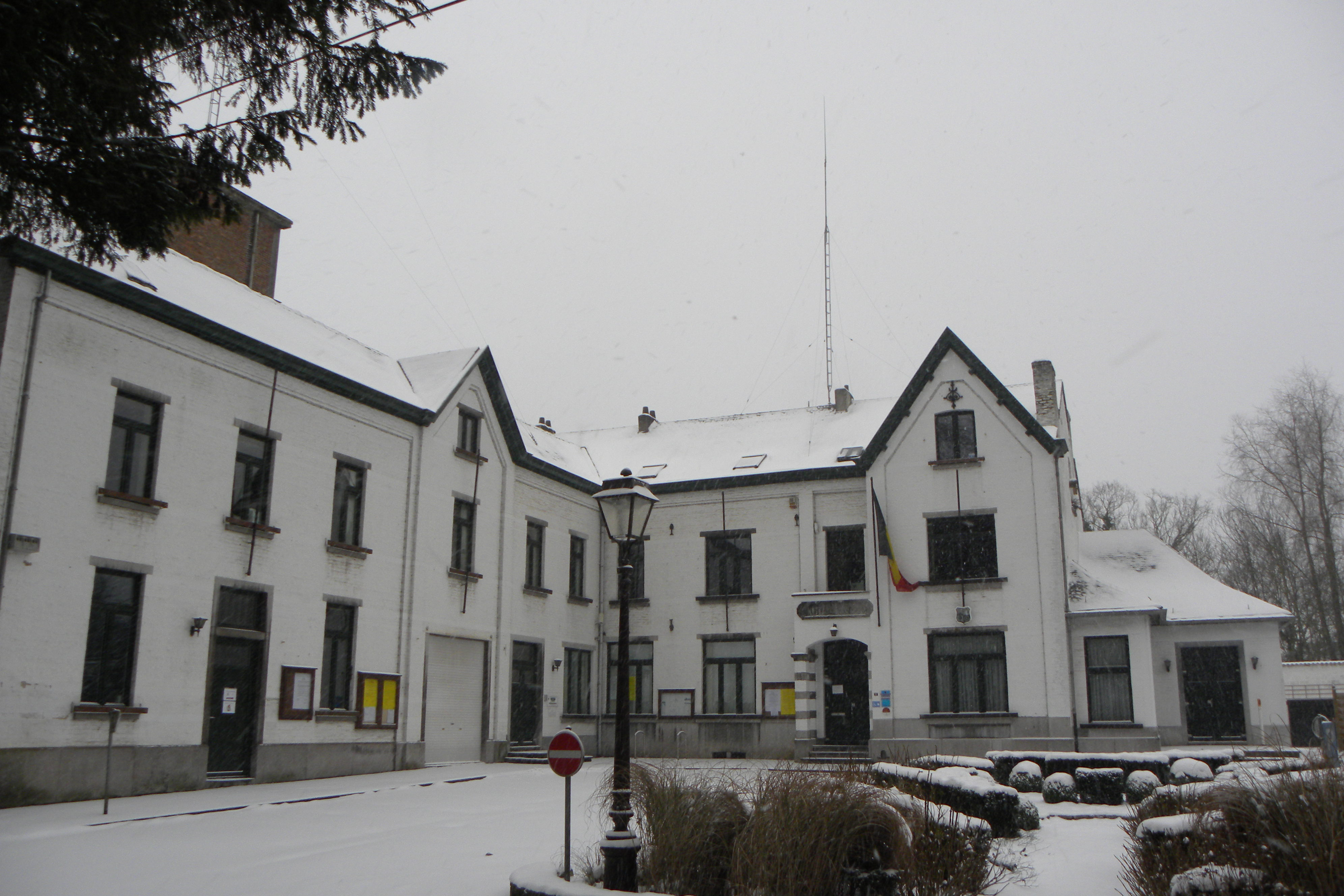 Maison communale de Court-Saint-Etienne (rue des Ecoles), commune du Brabant Wallon, Hiver 2013.